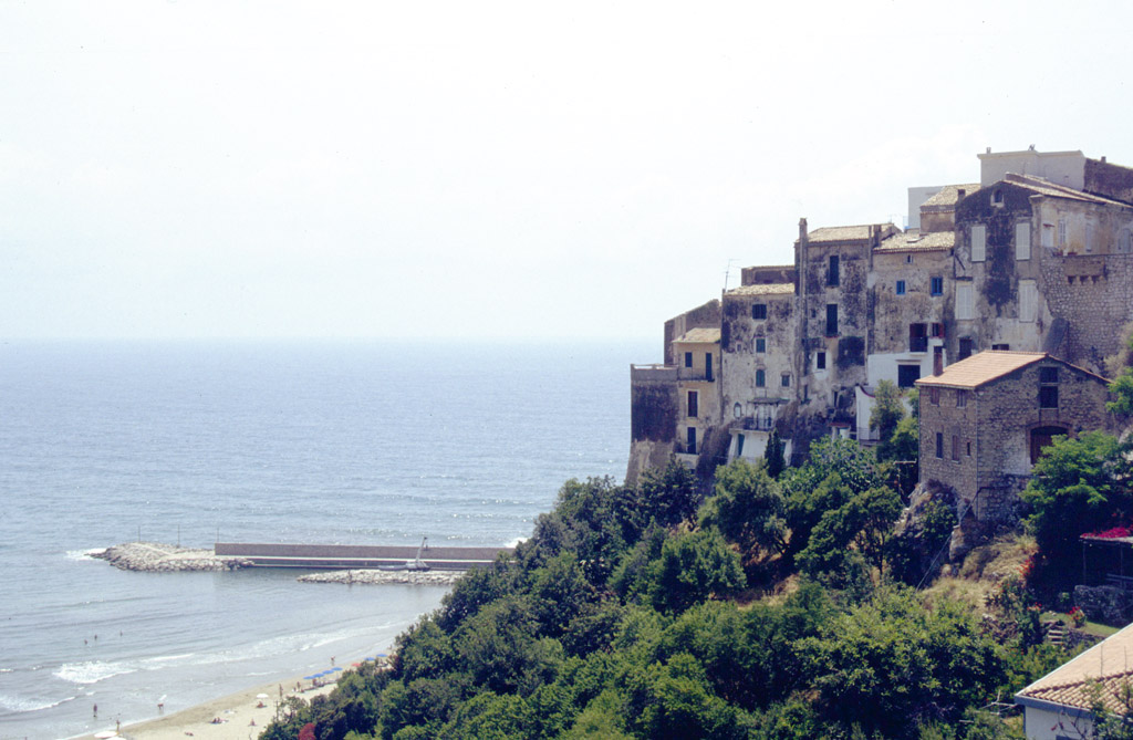 Sperlonga, Lazio, Italia